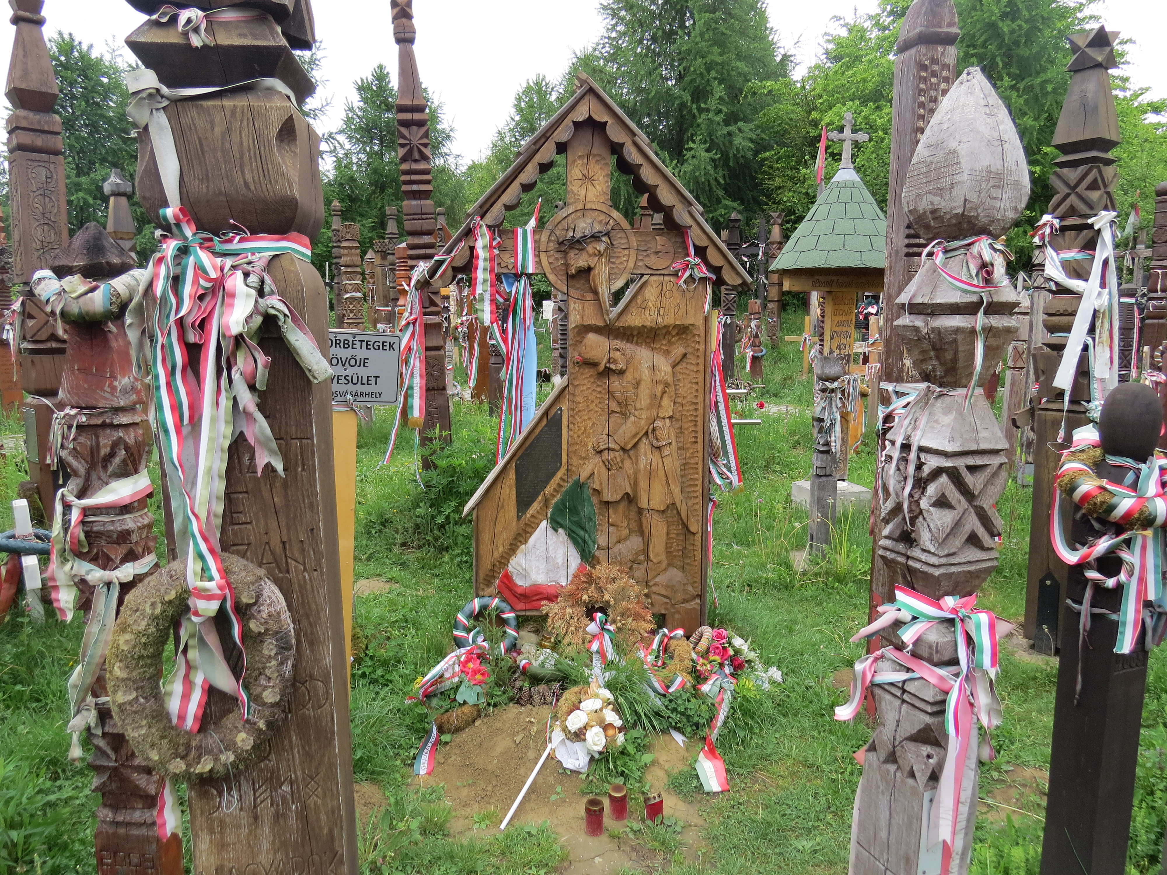 Nyerges-tető, az 1848–49-es forradalom és szabadságharc egyik utolsó székelyföldi csatájának színhelye. Az erdő szélén lévő területen, egy tömegsírba hantolták el akkor az ütközet áldozatait, akiknek emlékét többek közt számtalan kopjafa őrzi.